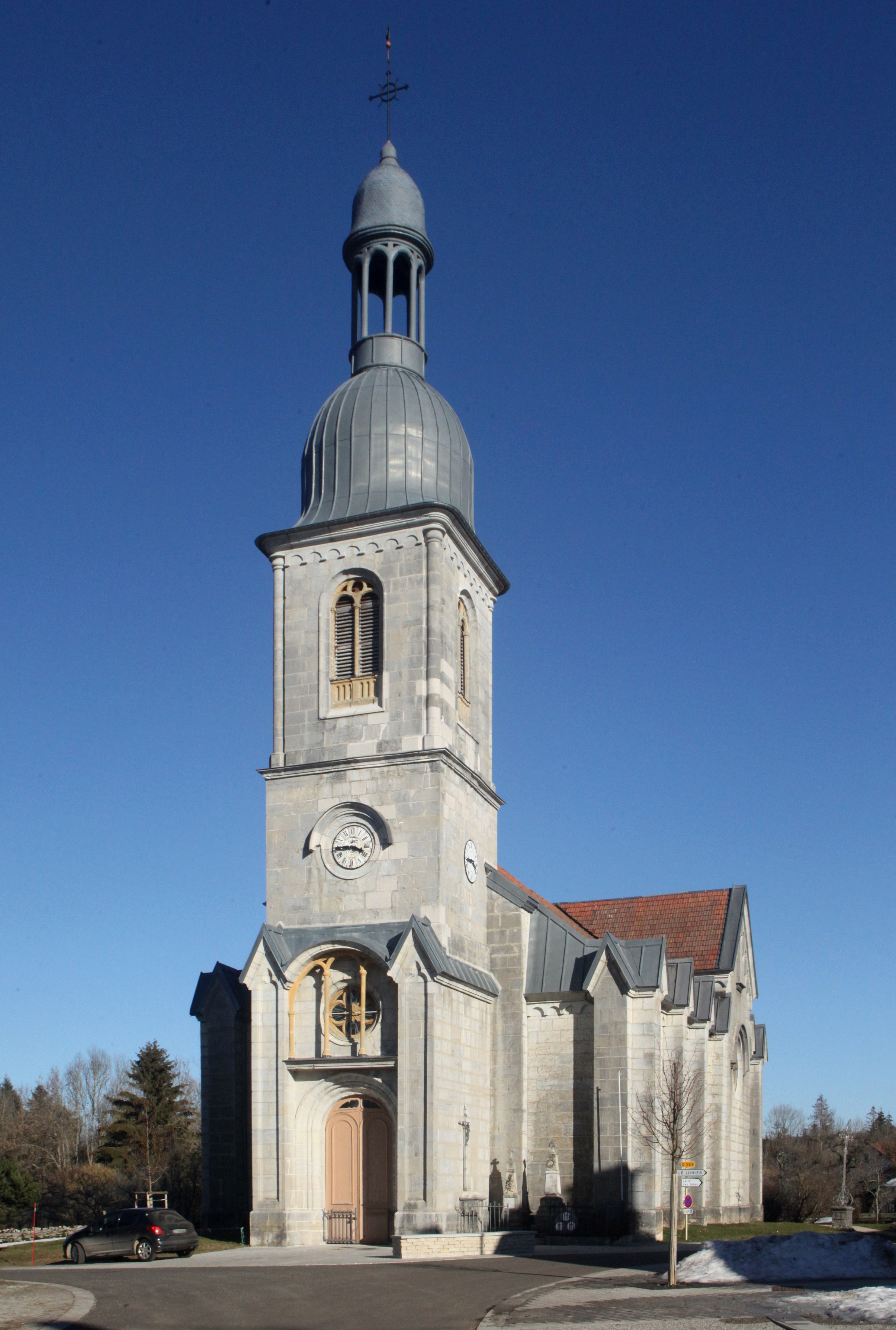 Eglise de Mont-de-Laval.